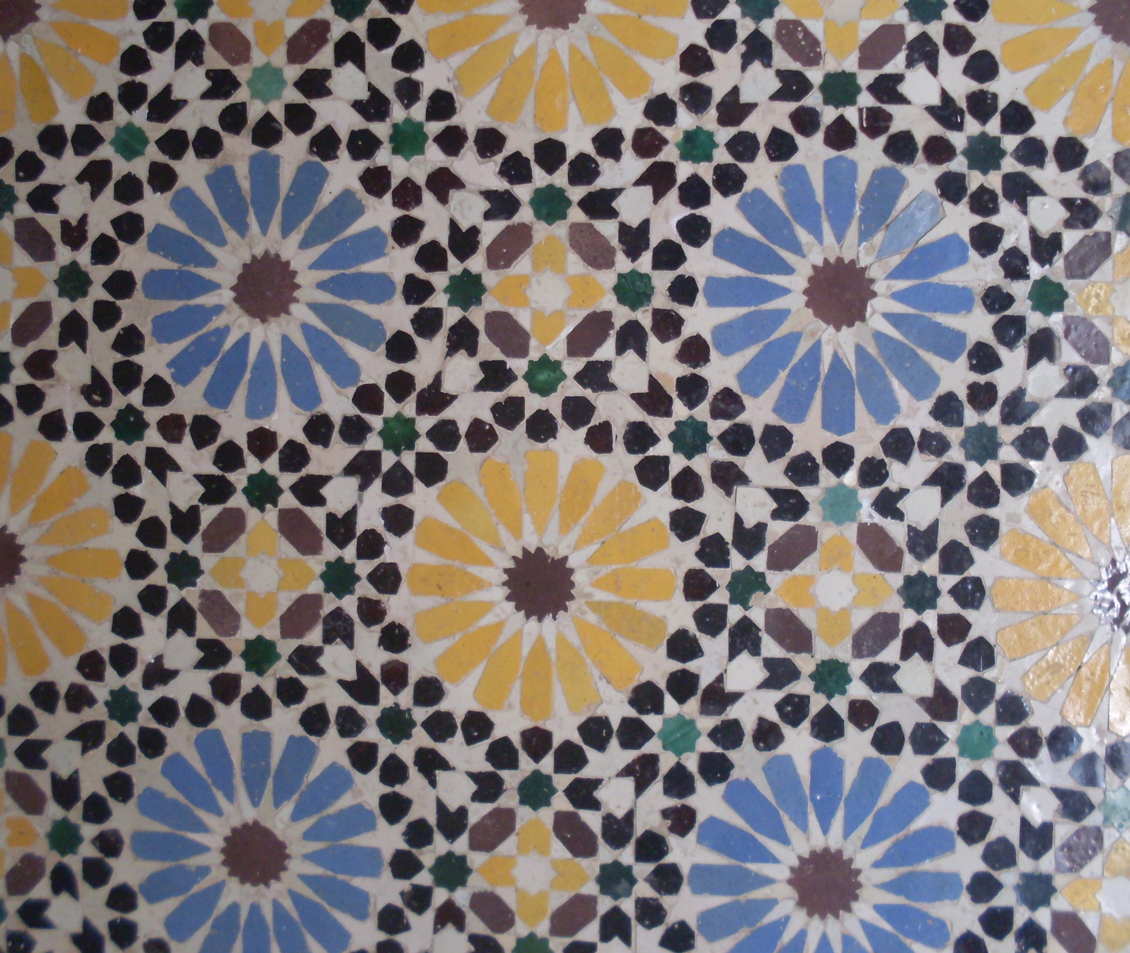 Tunis, Faiences au mausolée de Sidi Kacem el Djellizi